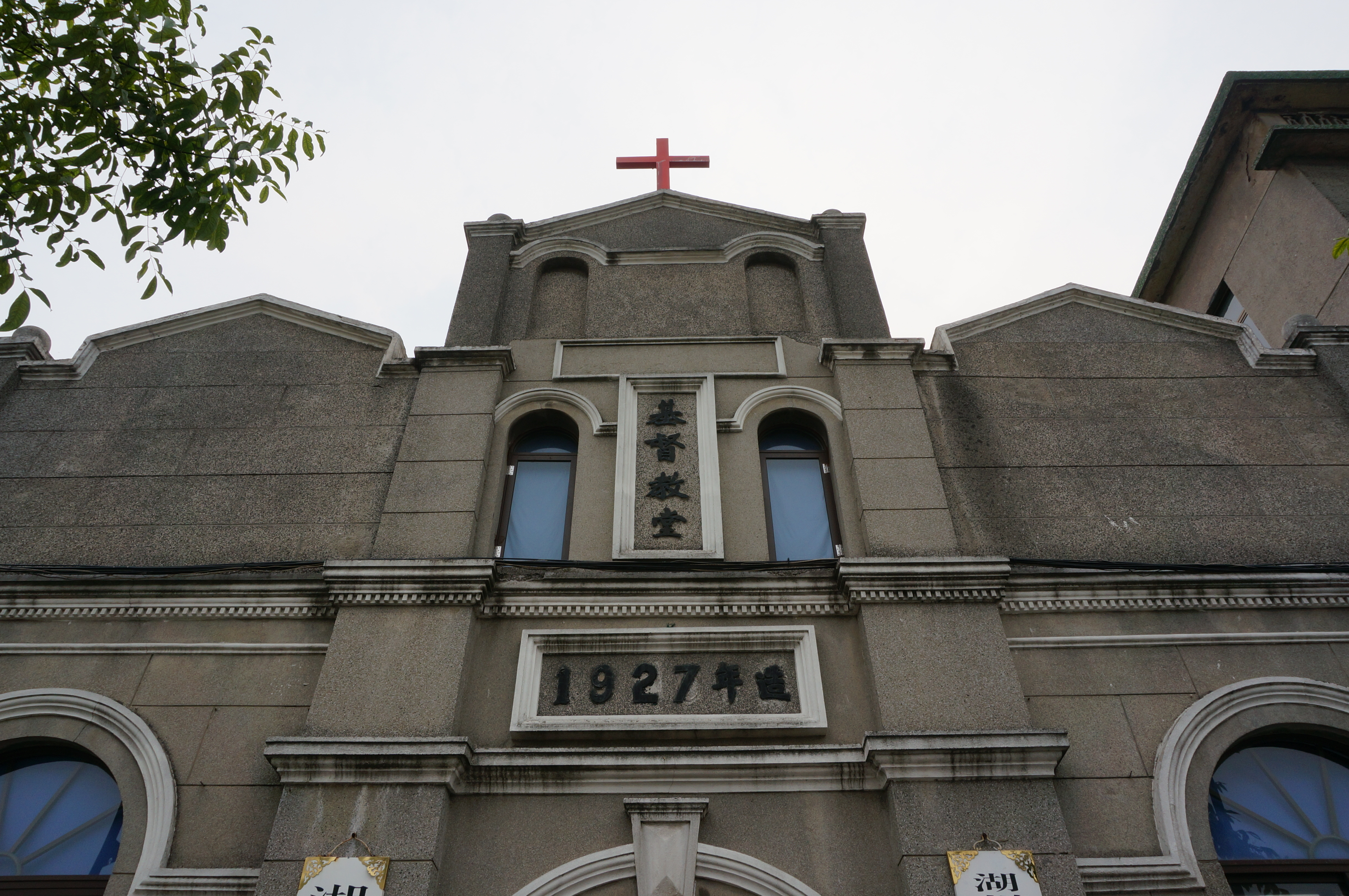 南浔基督教堂（耶稣堂），东面仰视。